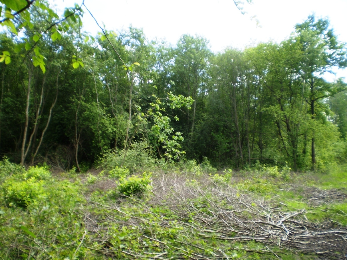 Šukionių piliakalnio apylinkės, Kėdainių raj.